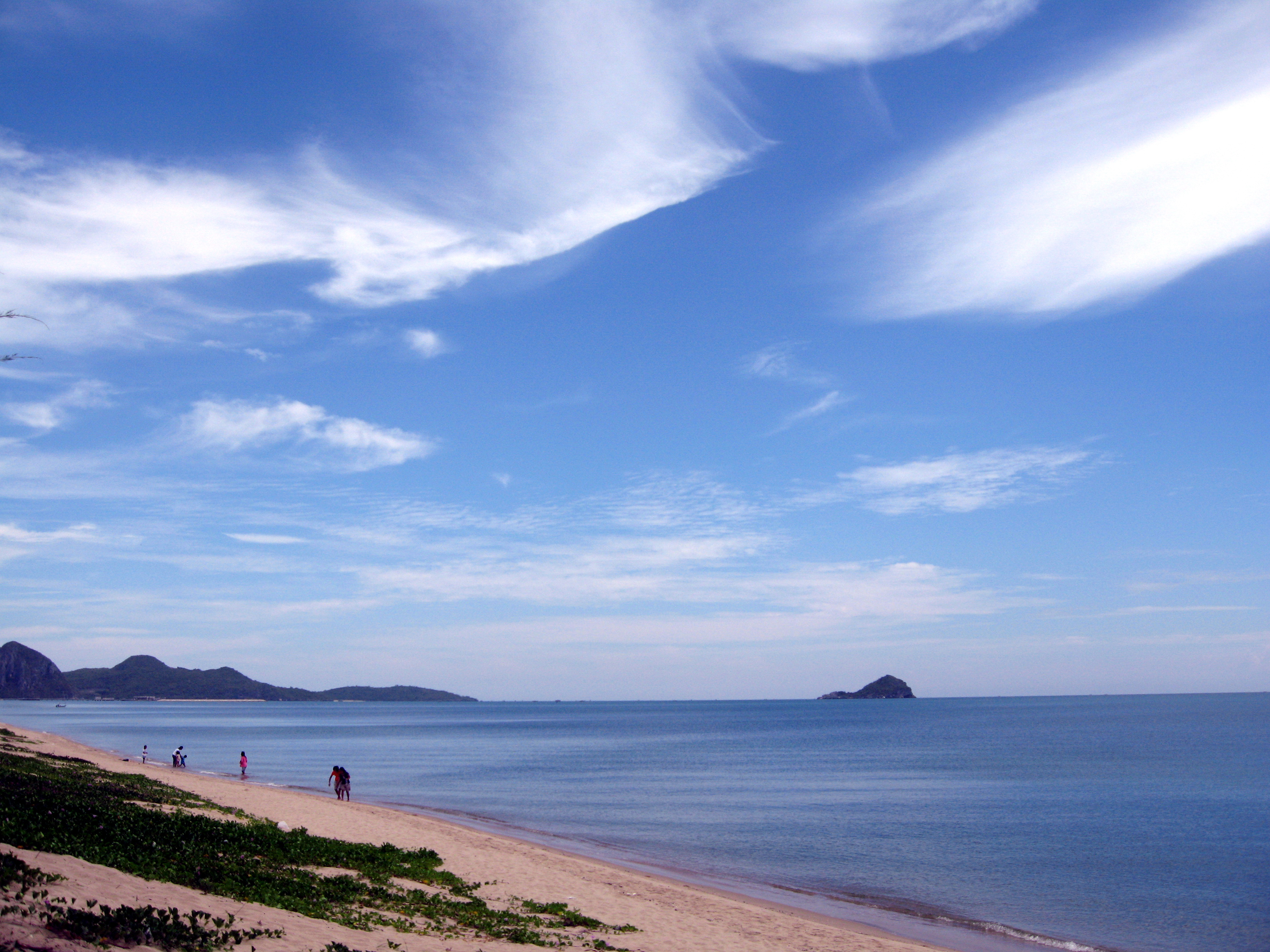 ชายหาดหว้ากอ จ.ประจวบคีรีขันธ์ : Wah Kor Beach